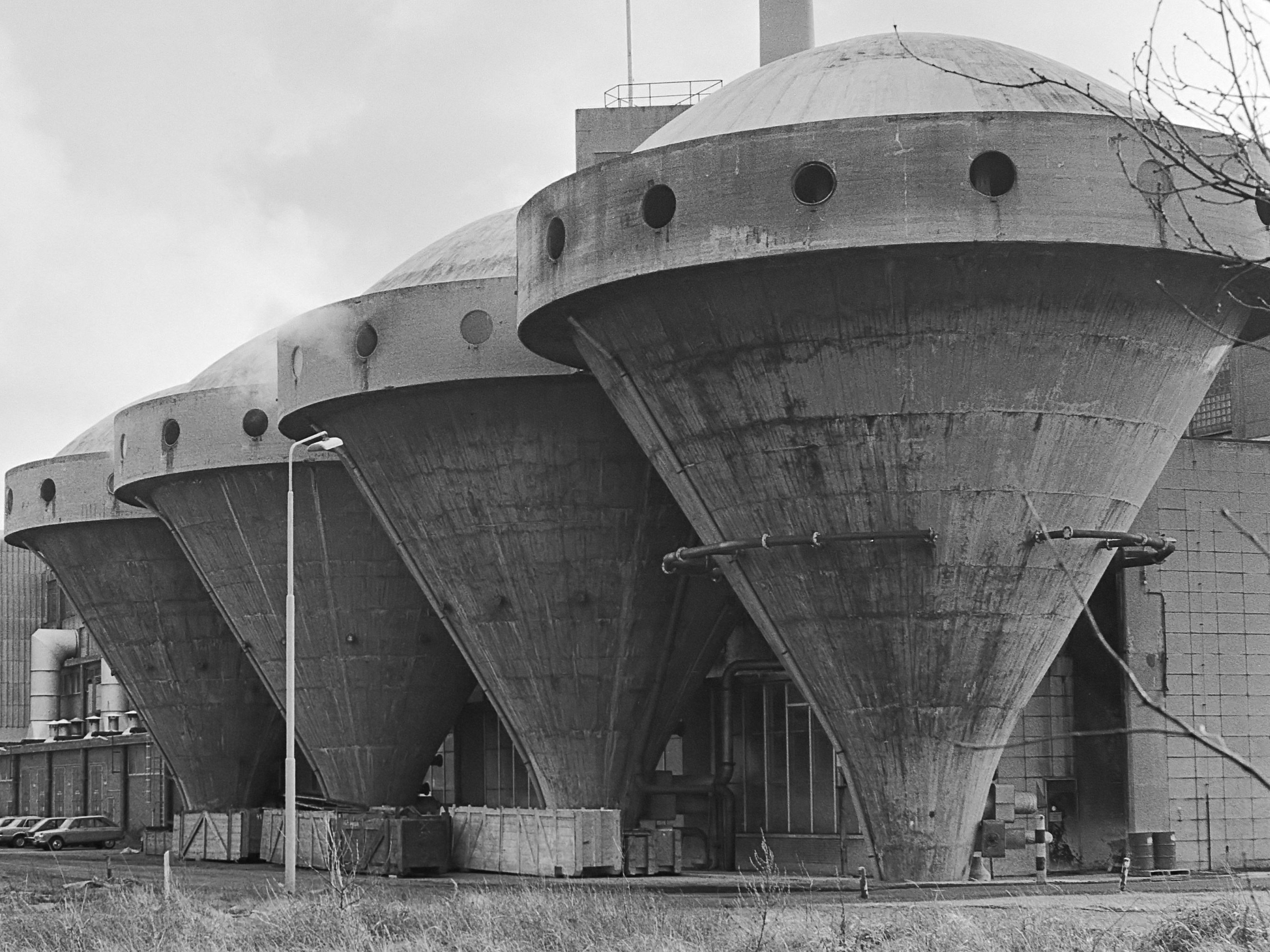 De fabriek van Van Gelder papier in Velsen 26 januari 1981